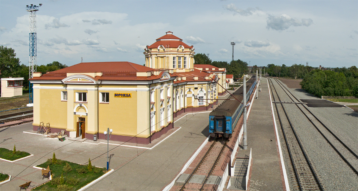 Станція Ворожба. Вокзал і сумський парк